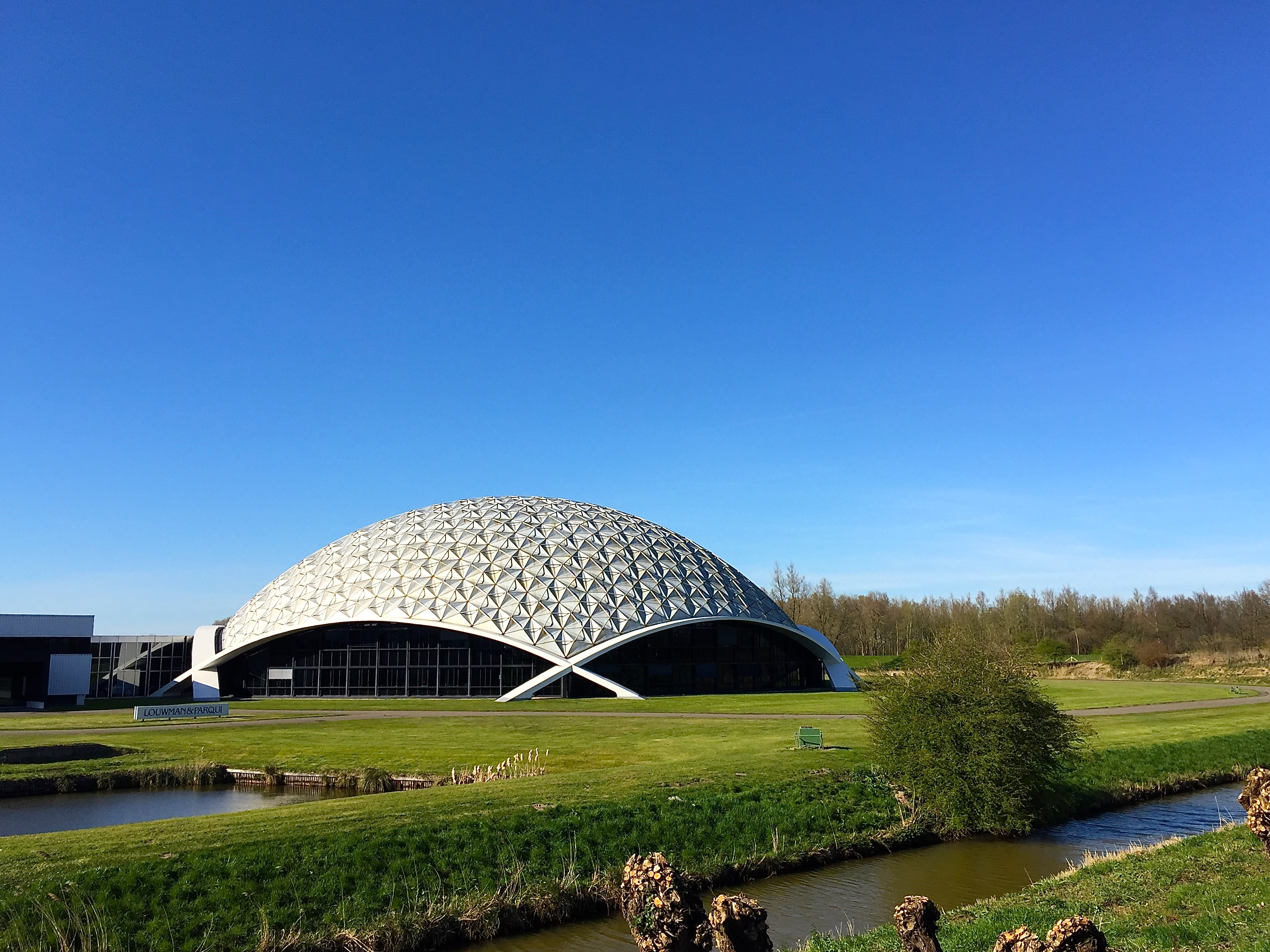 Louwman & Parqui, de Nederlandse importeur van Toyota en Lexus, is gevestigd in Raamsdonksveer. De huisvesting is zeer herkenbaar door ‘De Koepel’, ontworpen door de Amerikaanse architect Richard Buckminster Fuller. De bolvormige constructie van ‘De Koepel’ is zelfdragend en extra stijf. Hierdoor zijn pilaren overbodig.